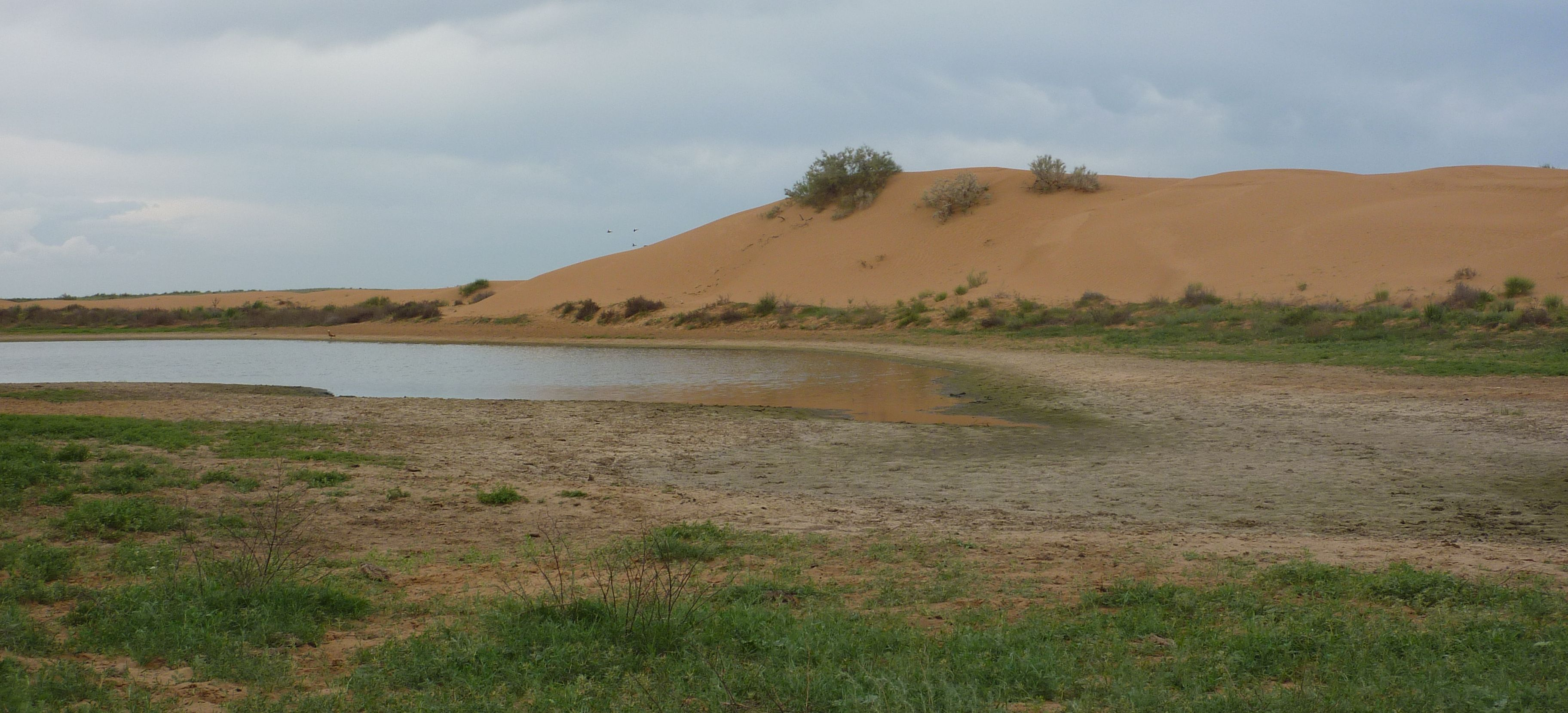 Sanddünen in der Oblast Astrachan, Russland, in der Nähe von Narimanov